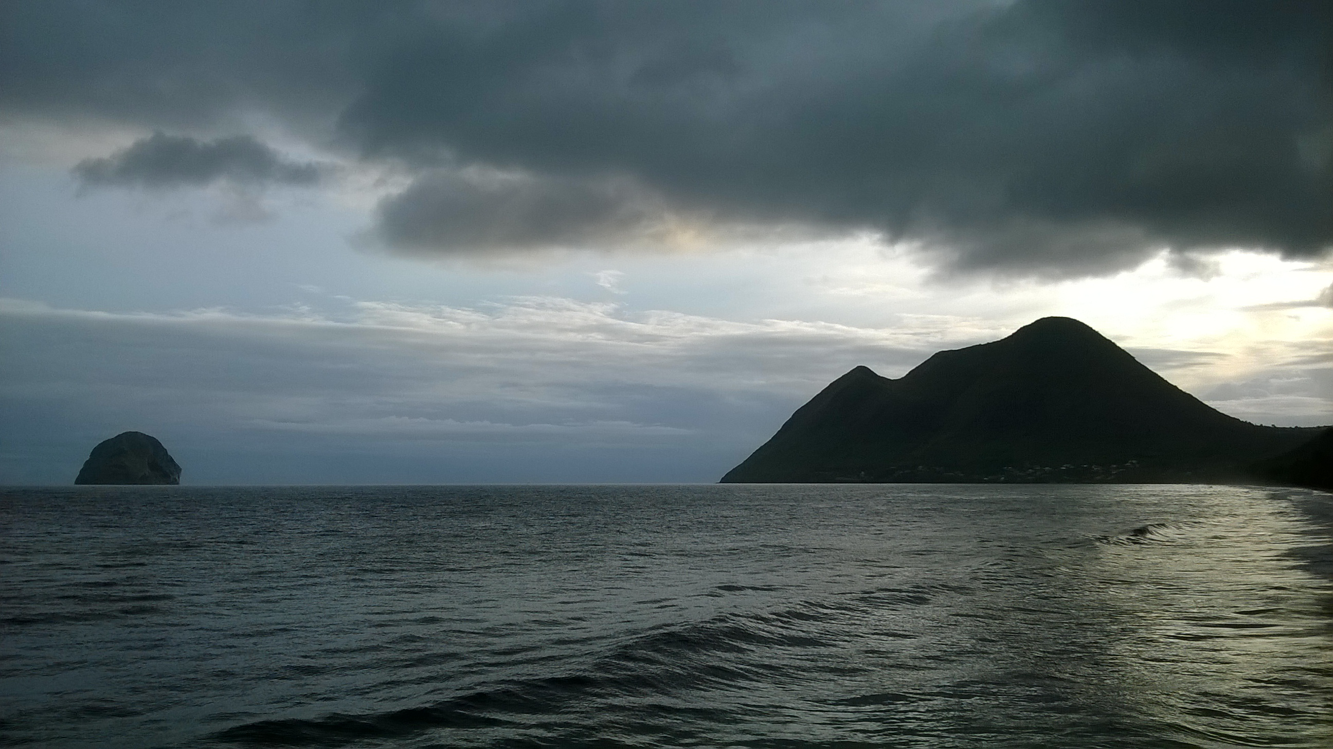 Passe des Fours, entre le Morne Larcher et le Rocher du Diamant, depuis la Plage du Diamant, Martinique